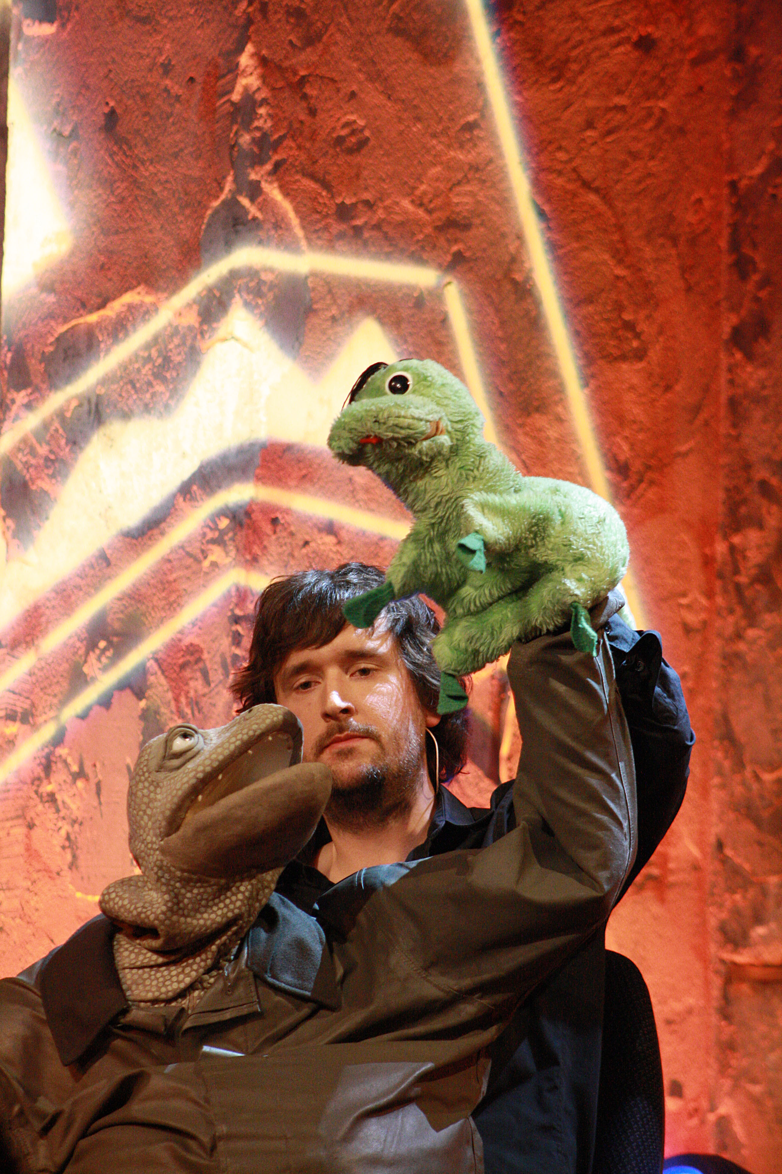 Jurypreis Frühreif & Verdorben, 2012 „In einer faszinierenden Symbiose von Mensch und Echse gelingt es Michael Hatzius, ein ganzes Universum erlebbar werden zu lassen. Seine Echse, als Alter Ego von uns allen, erklärt uns das Leben und die Kunst aus ihrer Sicht und erweitert auf unkonventionelle, unterhaltsame Art das Wissen über Menschen, Urtiere und die Welt. Michael Hatzius lässt durch eine beeindruckende handwerkliche und künstlerische Präzision jede Regung seines Kaltblüters lebendig werden und verteilt beiläufig grundgültige Wahrheiten. Mit sparsamen Mitteln gelingt es ihm, Spannung zu erzeugen und zu halten. Die Echse lebt, sie bekommt einen Preis, der ihr nach 3.000 Jahren Theatergeschichte wahrscheinlich egal ist, aber wir gratulieren dennoch ihrem Kassengestell Michael Hatzius.“ (Begründung der Jury)